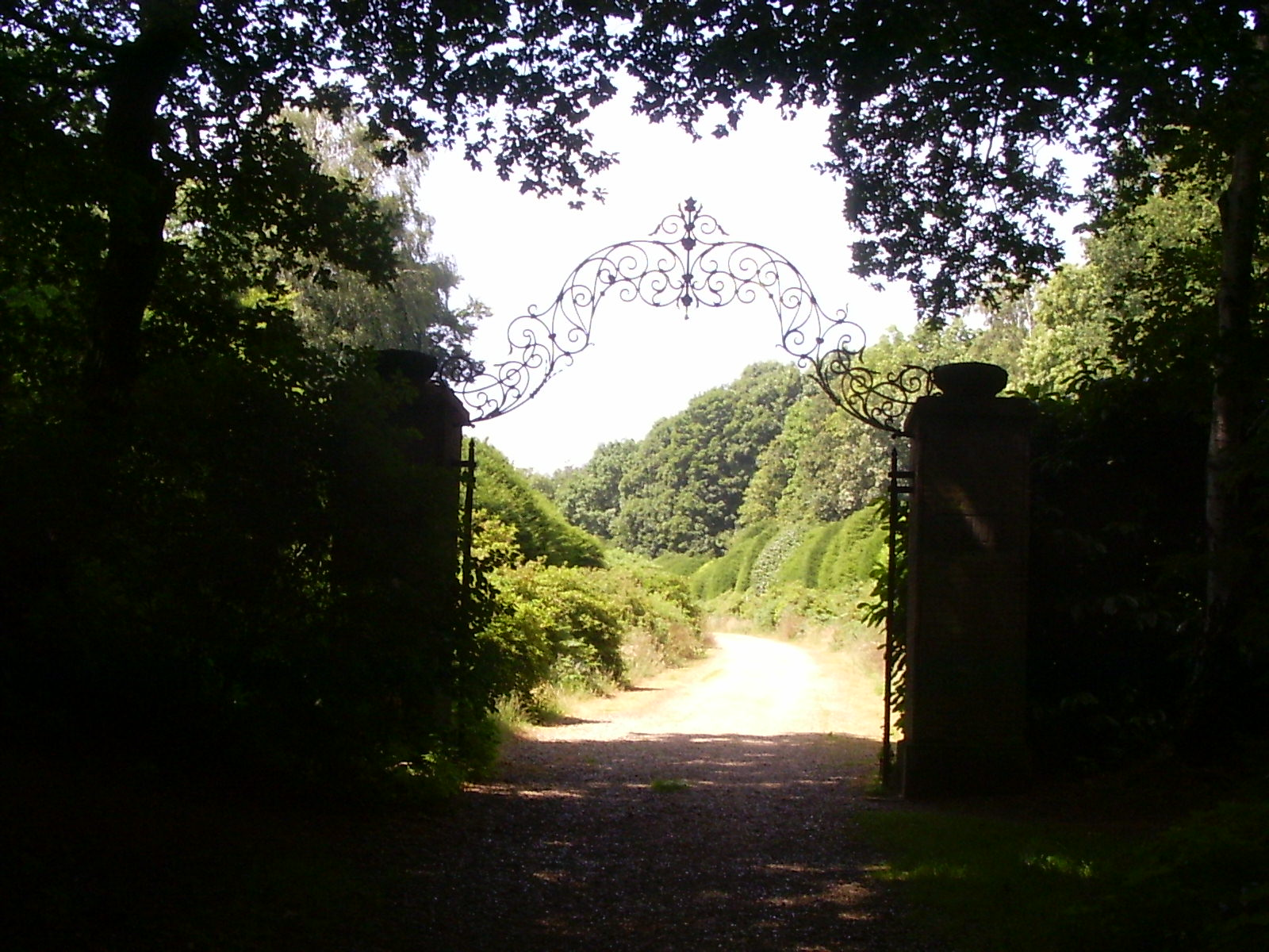 Doorwerth, toegangspoort tot het landgoed Duno vanaf Heveadorp, gemeentelijk monument 105